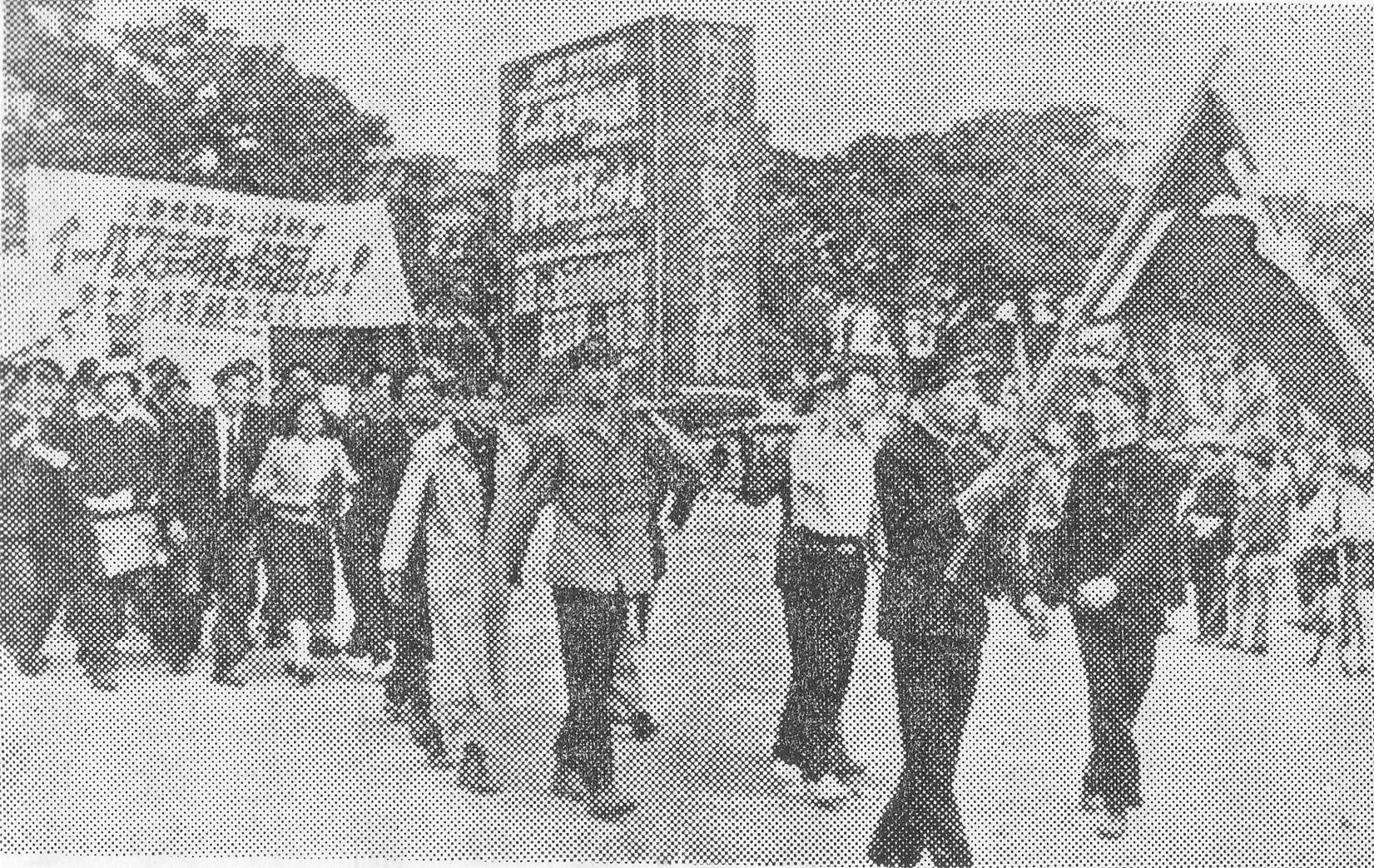 イールズ声明反対の学生デモ 東京大学